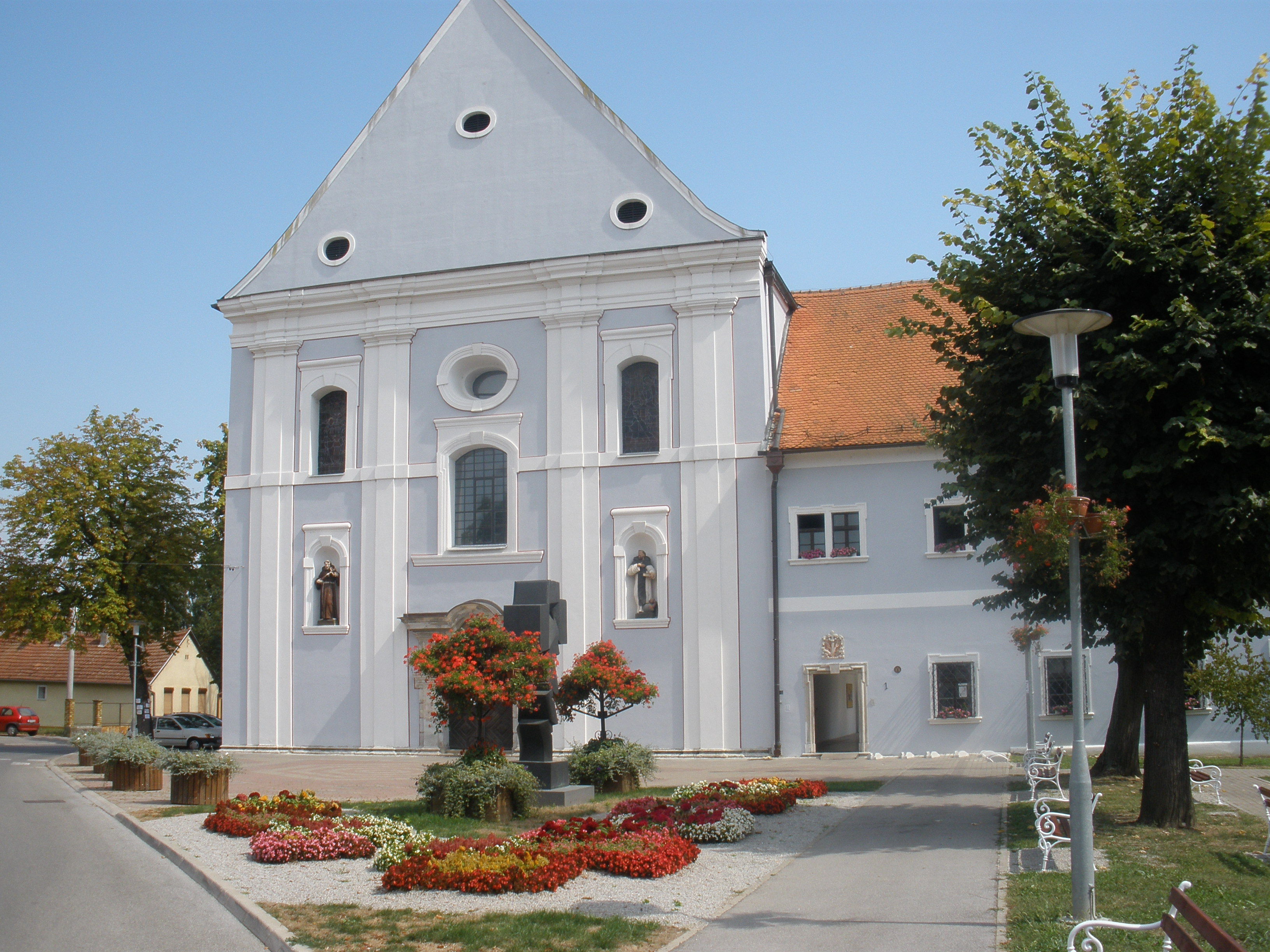 Franjevački samostan u Slavonskome Brodu.